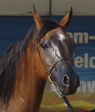 Cavalo Árabe, em exposição EMAPA - Avaré-SP-Brasil